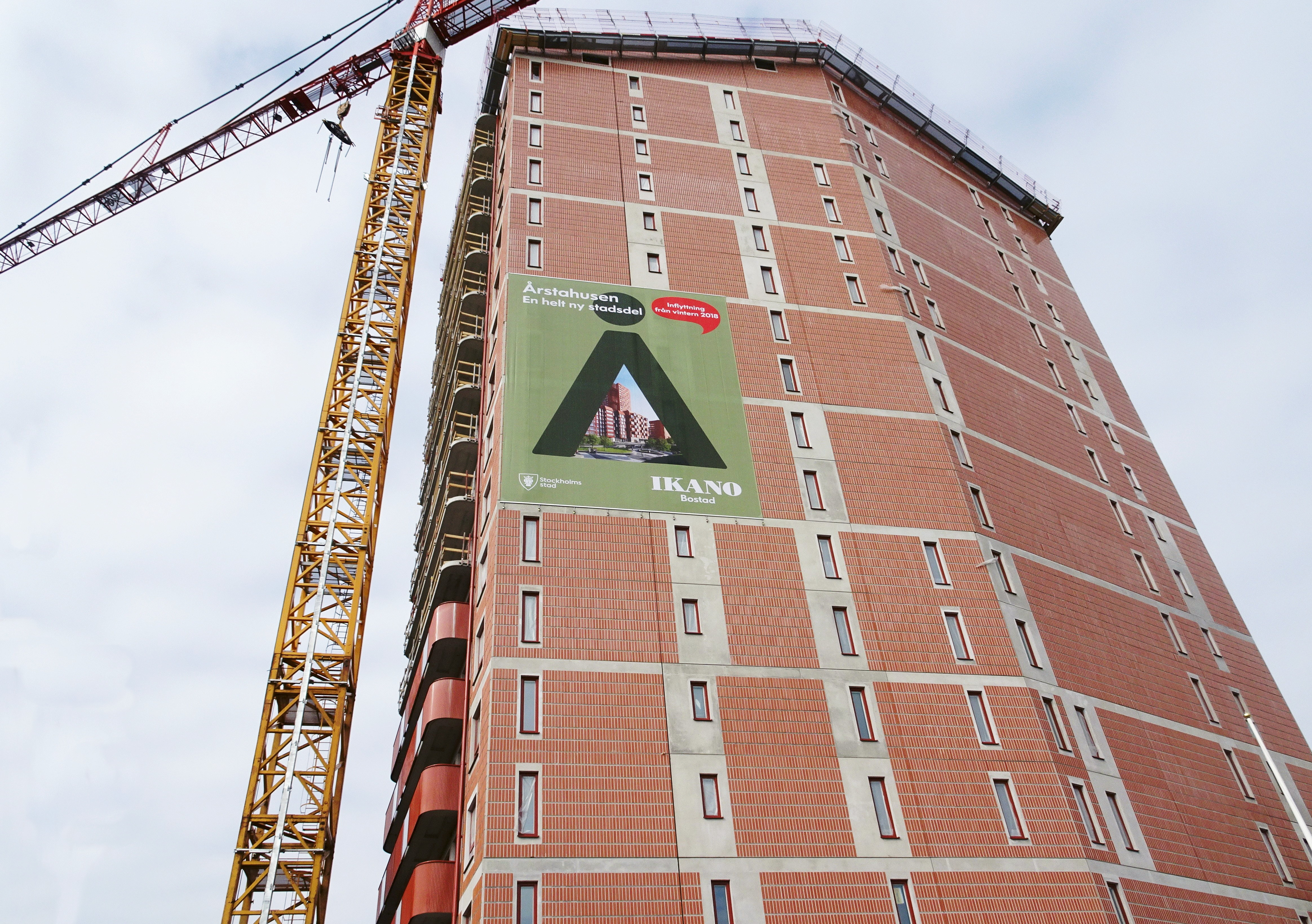 Årstahusen i Årstaberg